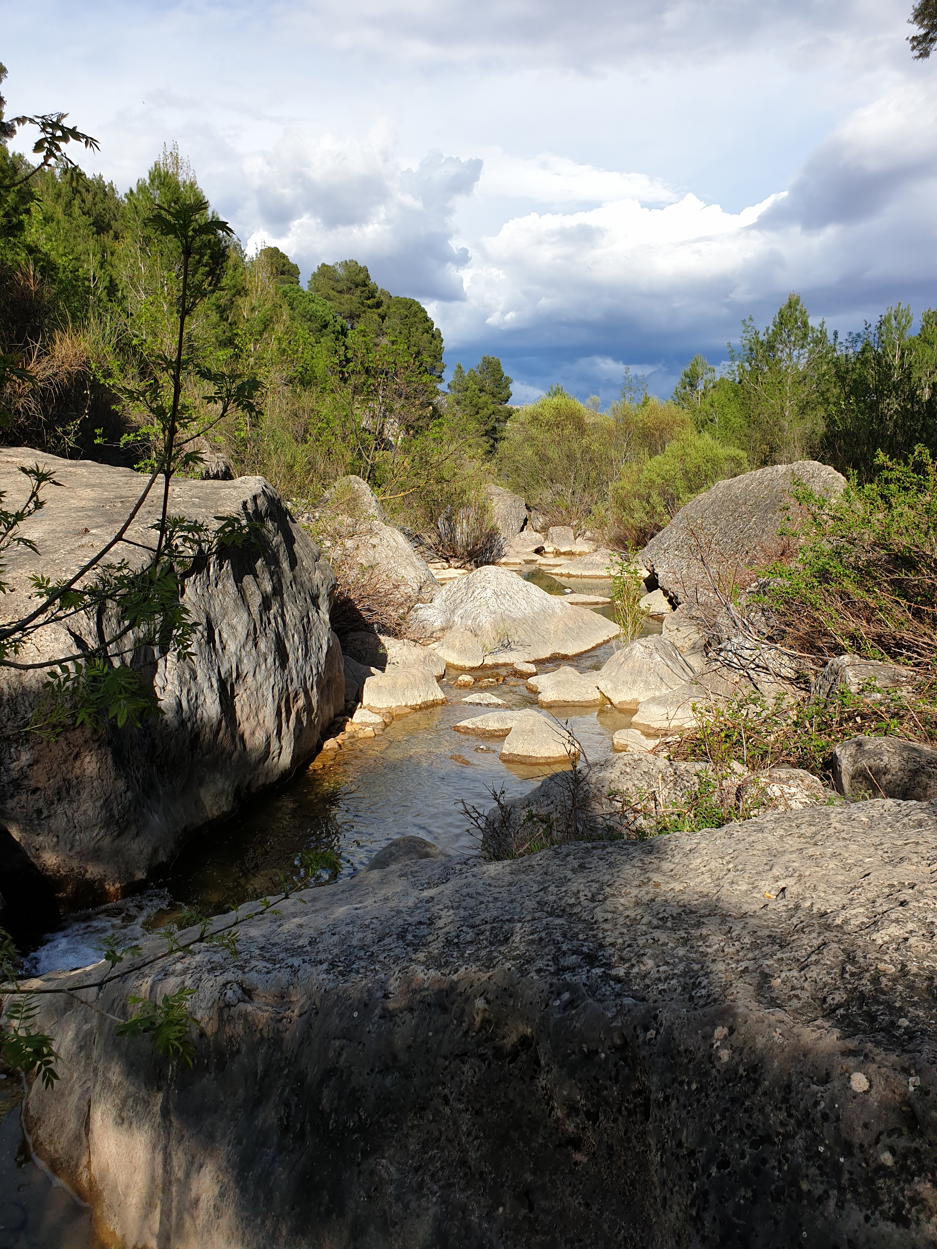 Río Brugent bajo el molino de la Font Gran, cerca de La Riba, en Tarragona This is a photography of a Special Area of Conservation in Spain with the ID: ES5140008. Natura2000 entry, EEA entry